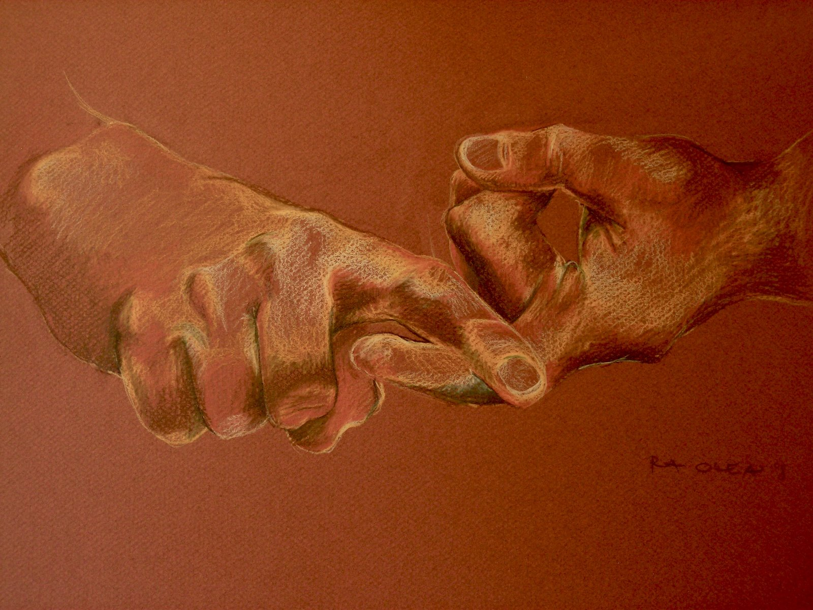 Zeichnung von R.A. Olea: sign language : friend, Farbstifte auf Tonpapier, 2008.Bemerkung: Die Zeichung zeigt einen Teil des Gebärdenzeichens für "Freund" in American Sign Language (ASL, 'Amerikanische Gebärdensprache'), das aus wechselseitigem "Verhaken" der Zeigefinger besteht.